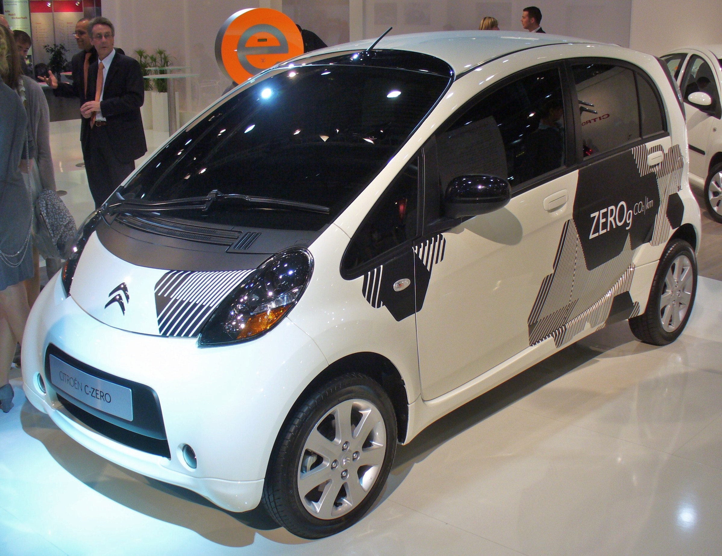 Citroen C-Zero